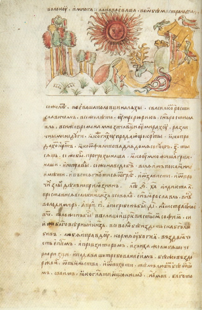 Радзивилловская (Кёнигсбергская) летопись.